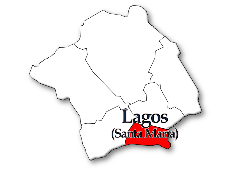 Censos 1864/2011